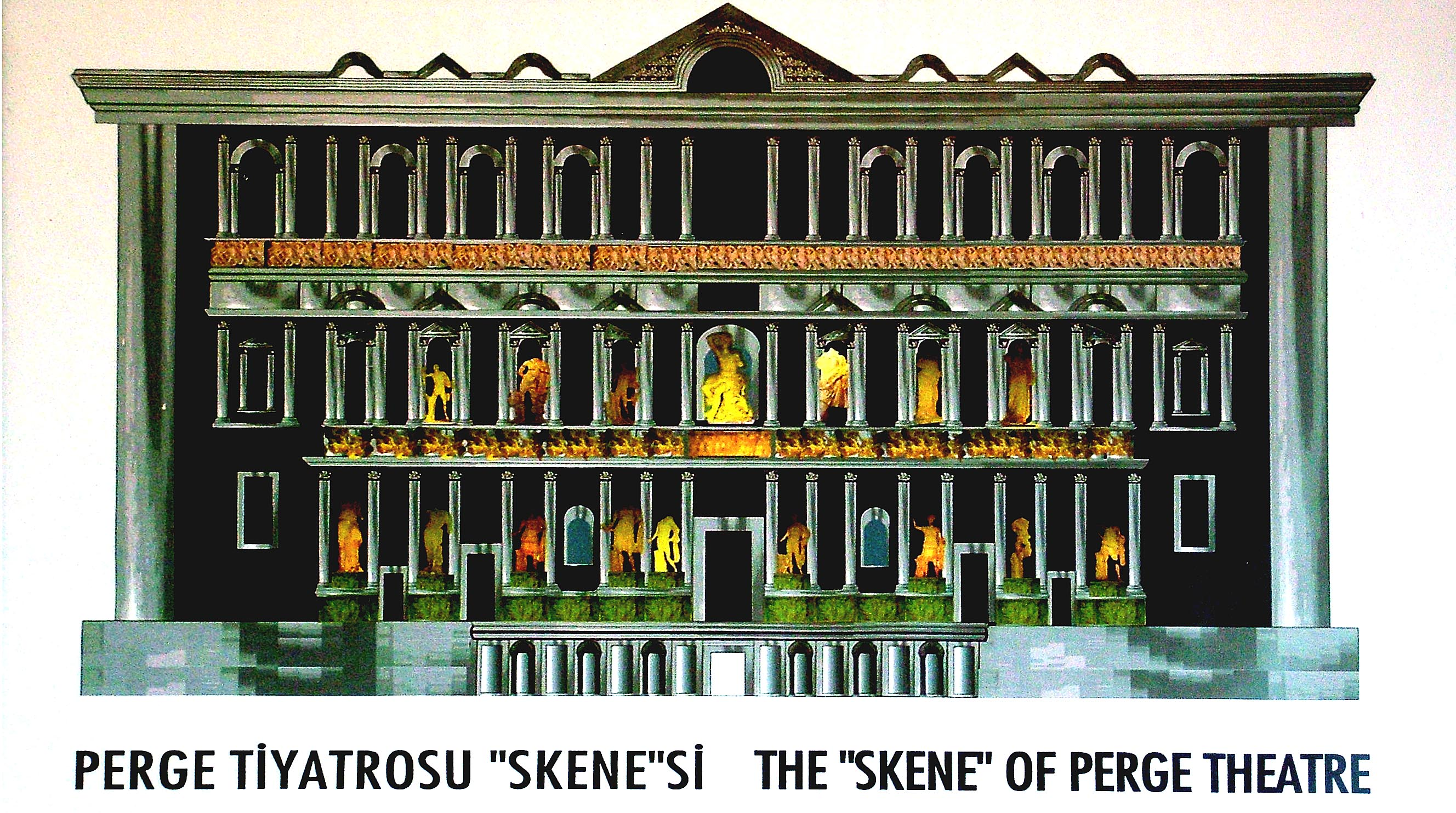 Régészeti Múzeum, Antalya, Törökország: A pergei színház szkéné-rajza